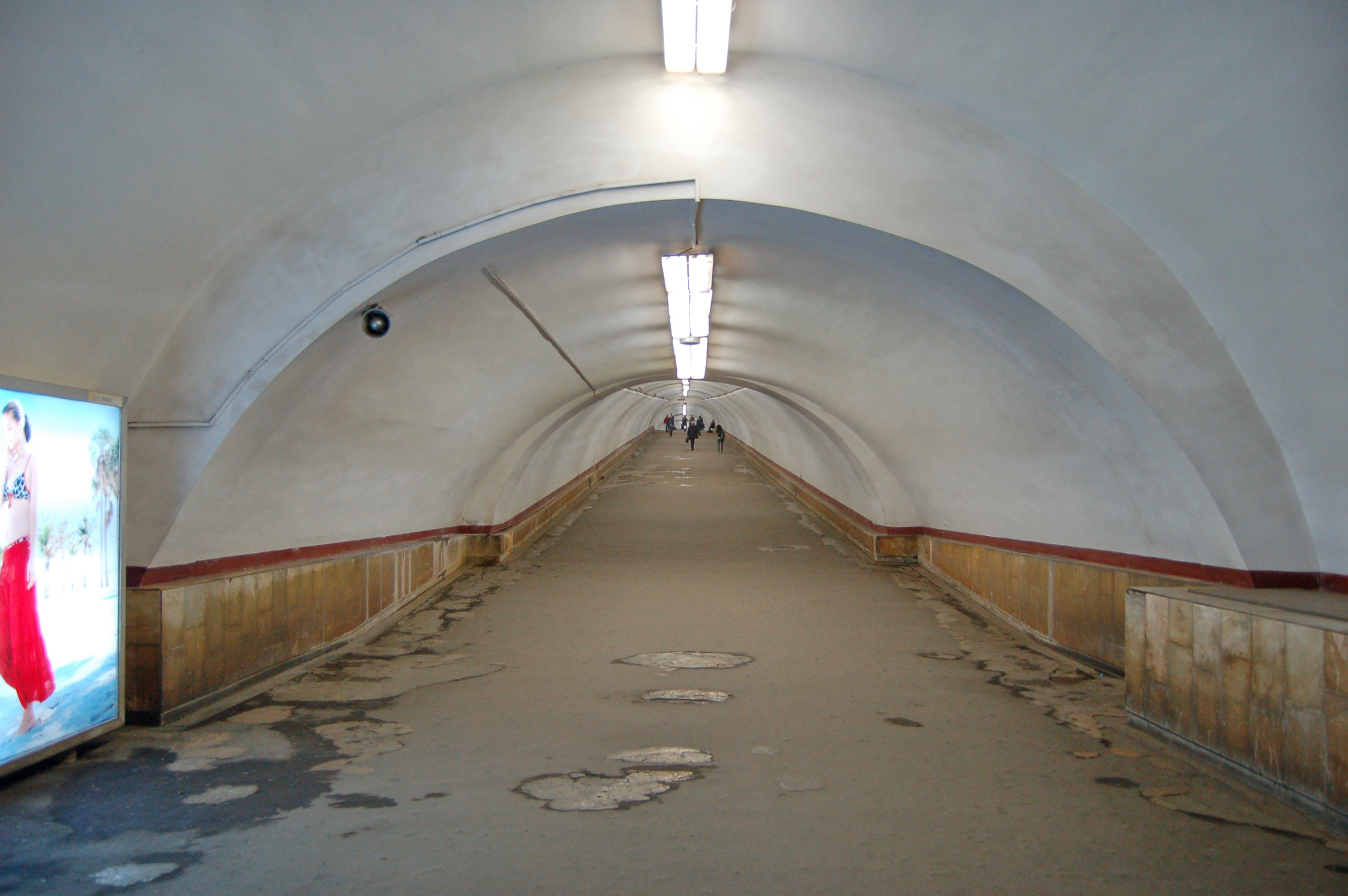 Переход между станциями метро «Крещатик» и «Площадь Независимости», пешеходный тоннель (длинный)